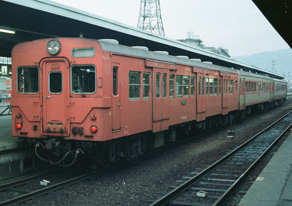 国鉄キハ35 199